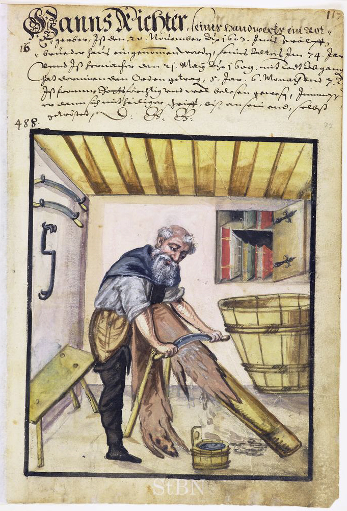 Hanns (Hans) Richter, Rotgerber (Gerber; Rotgerber) Transkription und weitere Informationen